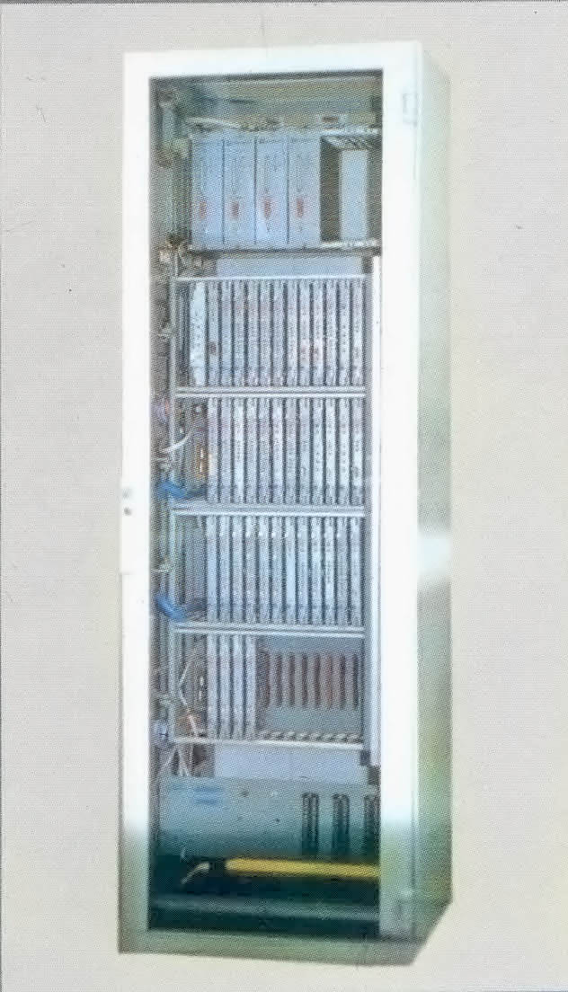 Базовый шкаф УКТС-А для автоматического управления технологическими процессами атомных электростанций